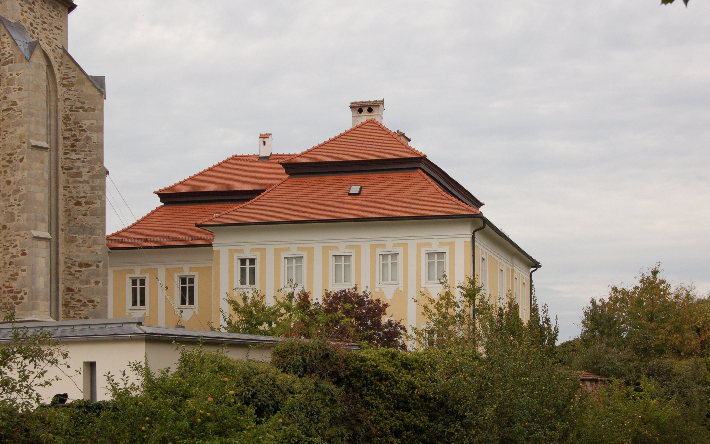 Der katholische Pfarrhof in Eferding, Oberösterreich.